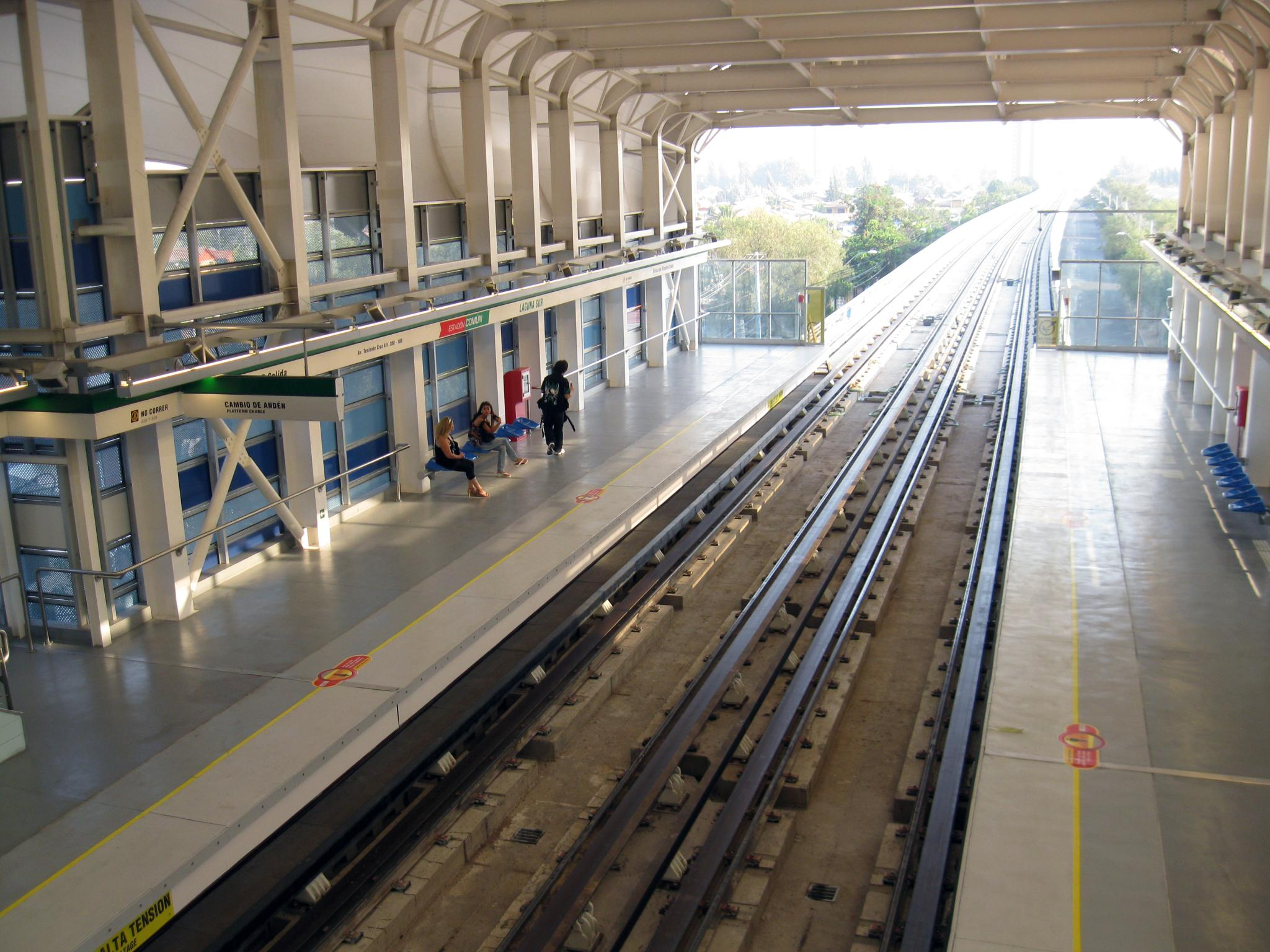 Extensión Poniente Línea 5: Febrero 2011